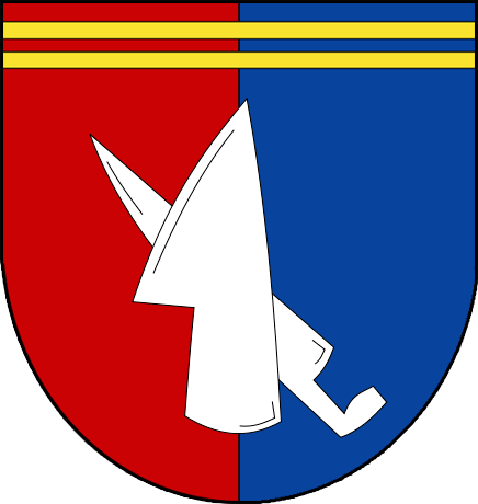 Stemma del comune ceco di Dolní Lažany